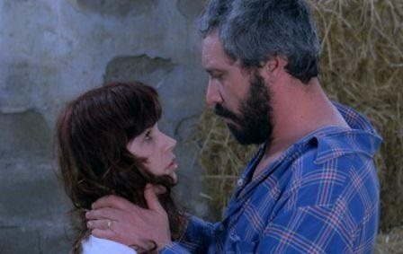 מיכל בת אדם ויוסף פולק בסרט עתליה